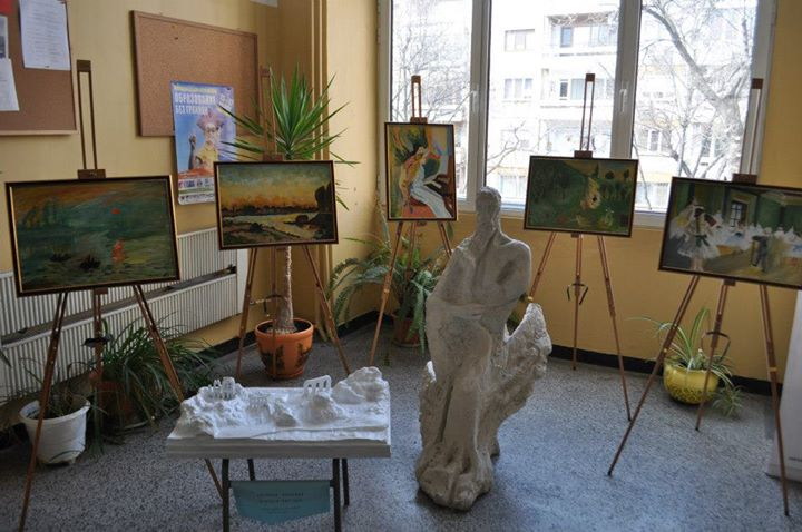 Ученическа картинна изложба, Ден на франкофонията (2013 г.)